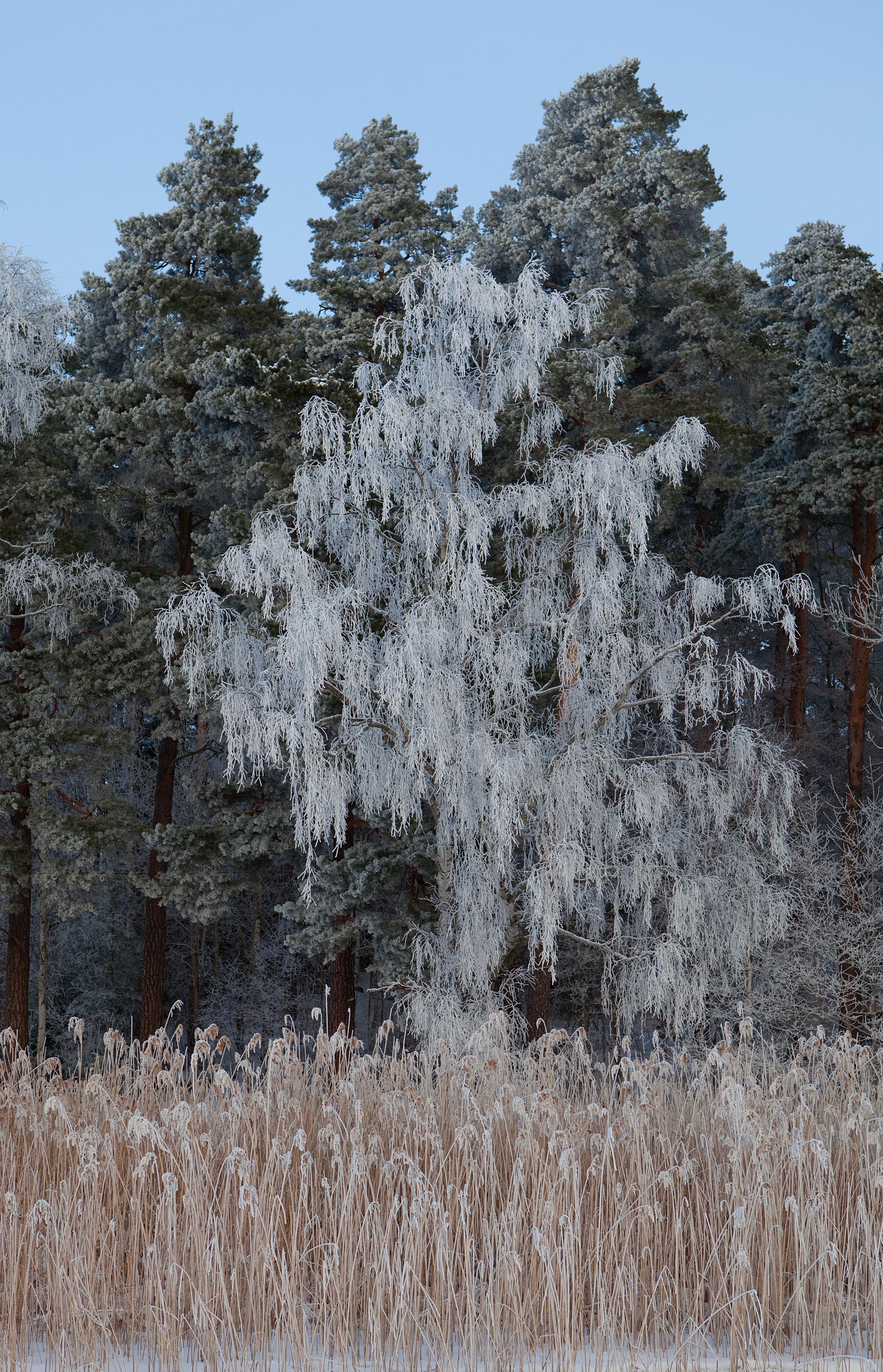 Björk och vass